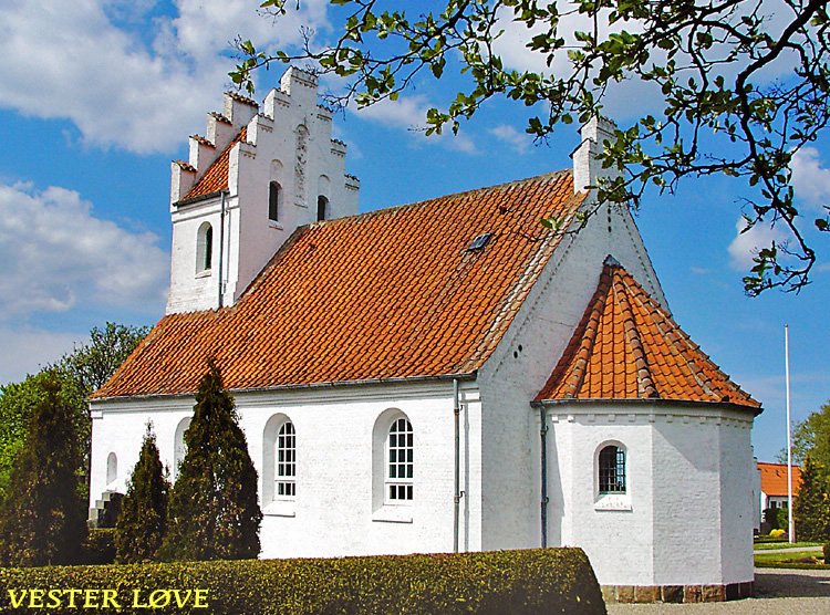 fra sydøst